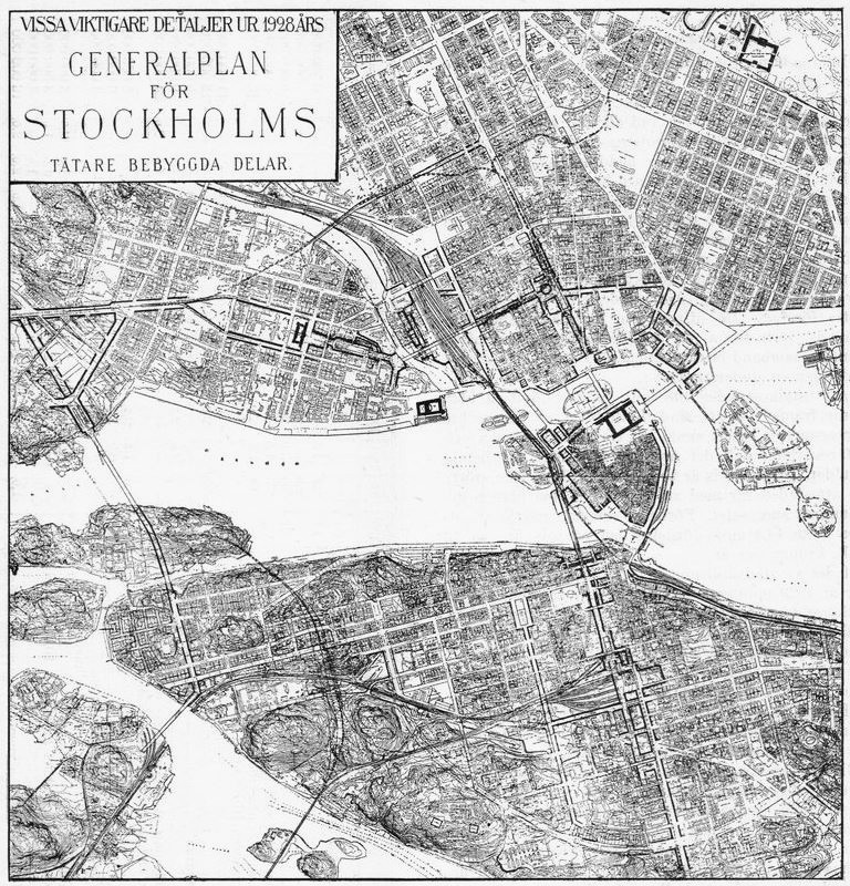 Generalplan för Stockholm 1928. Vissa viktigare detaljer...